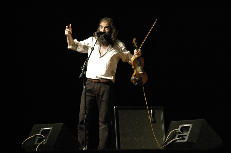 Dirty Three, Faenza (Italy), 2007